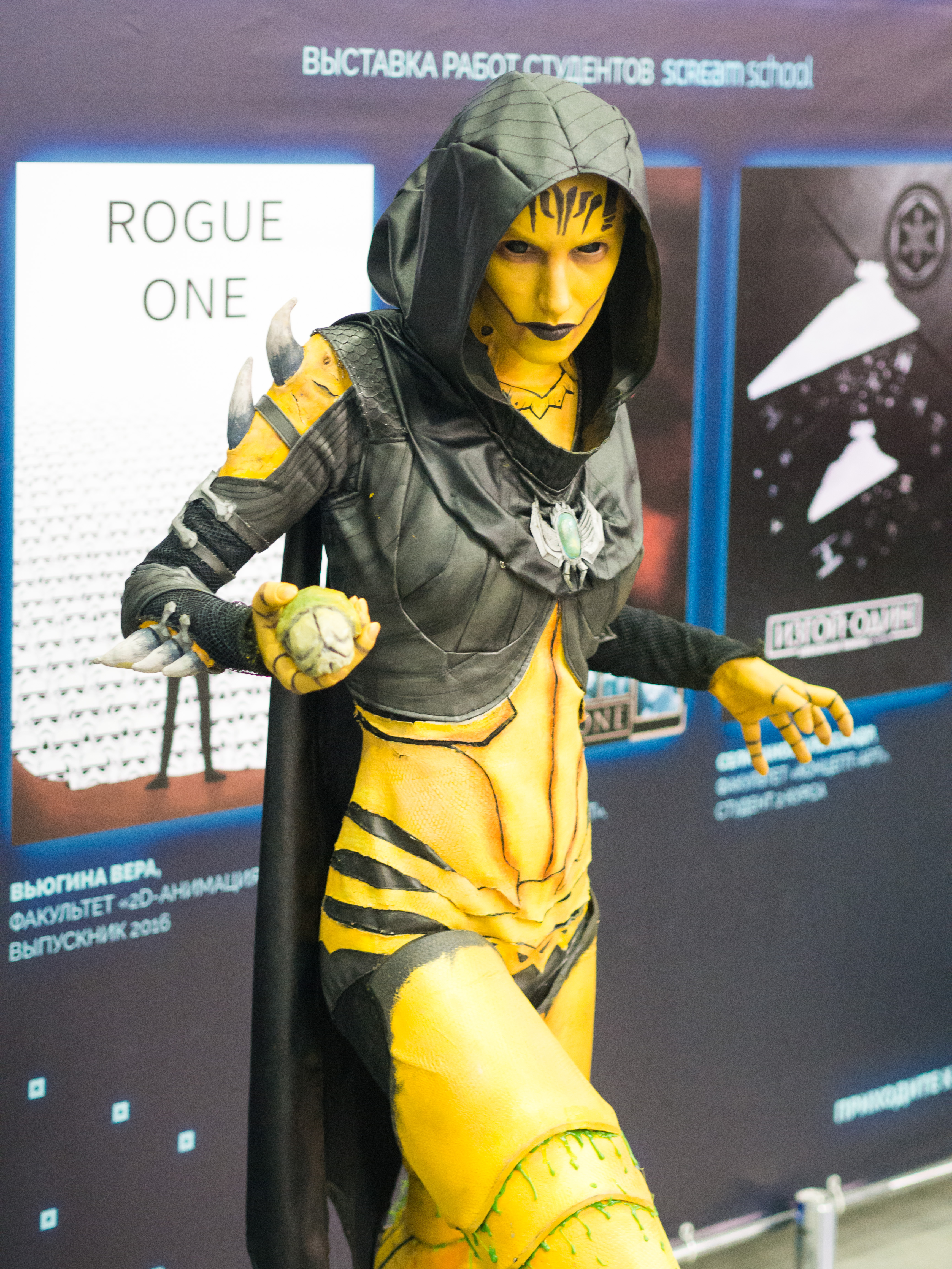 day 4